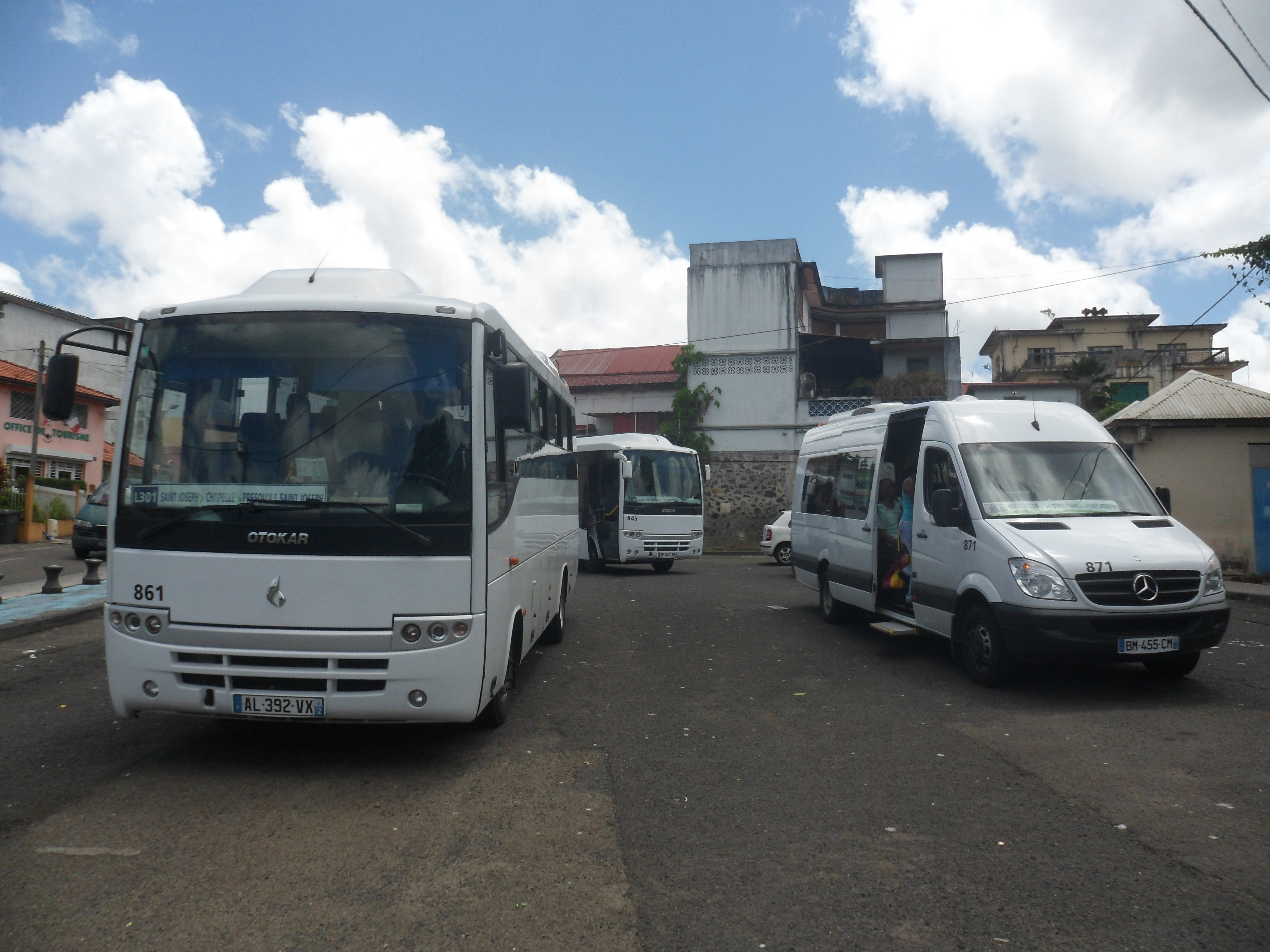 De nombreuses lignes du réseau Mozaïk sont gérées par des sous-traitants. Ici, à Saint-Joseph, aucune de ces trois lignes ne sont gérées directement par la CFTU.